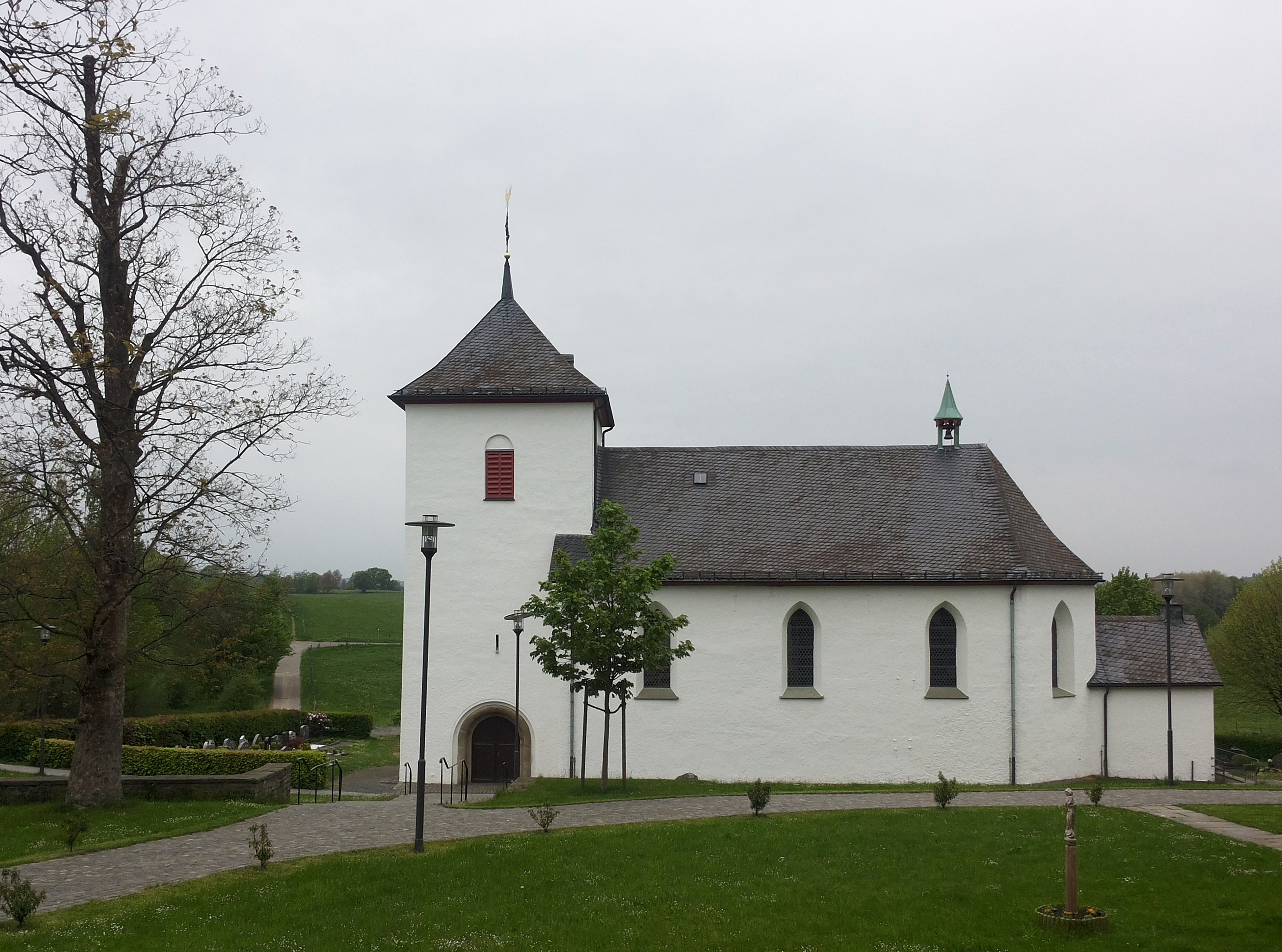 St. Marien Kirche in Wenden-Römershagen (Germany)